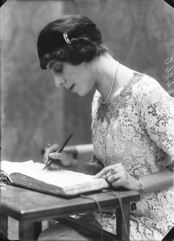 Amalia Guglielminetti fotografata da Mario Nunes Vais